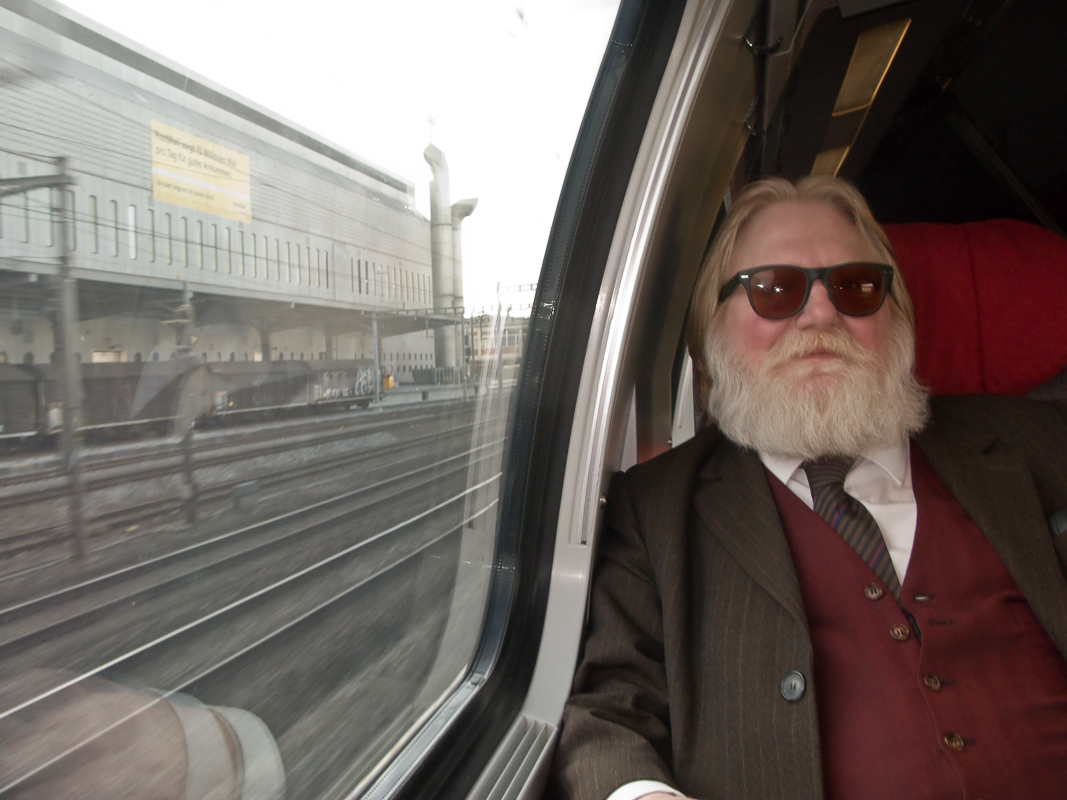 Pierre Louis Péclat